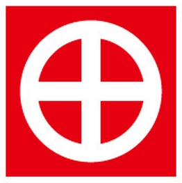 Embleme Shimadzu